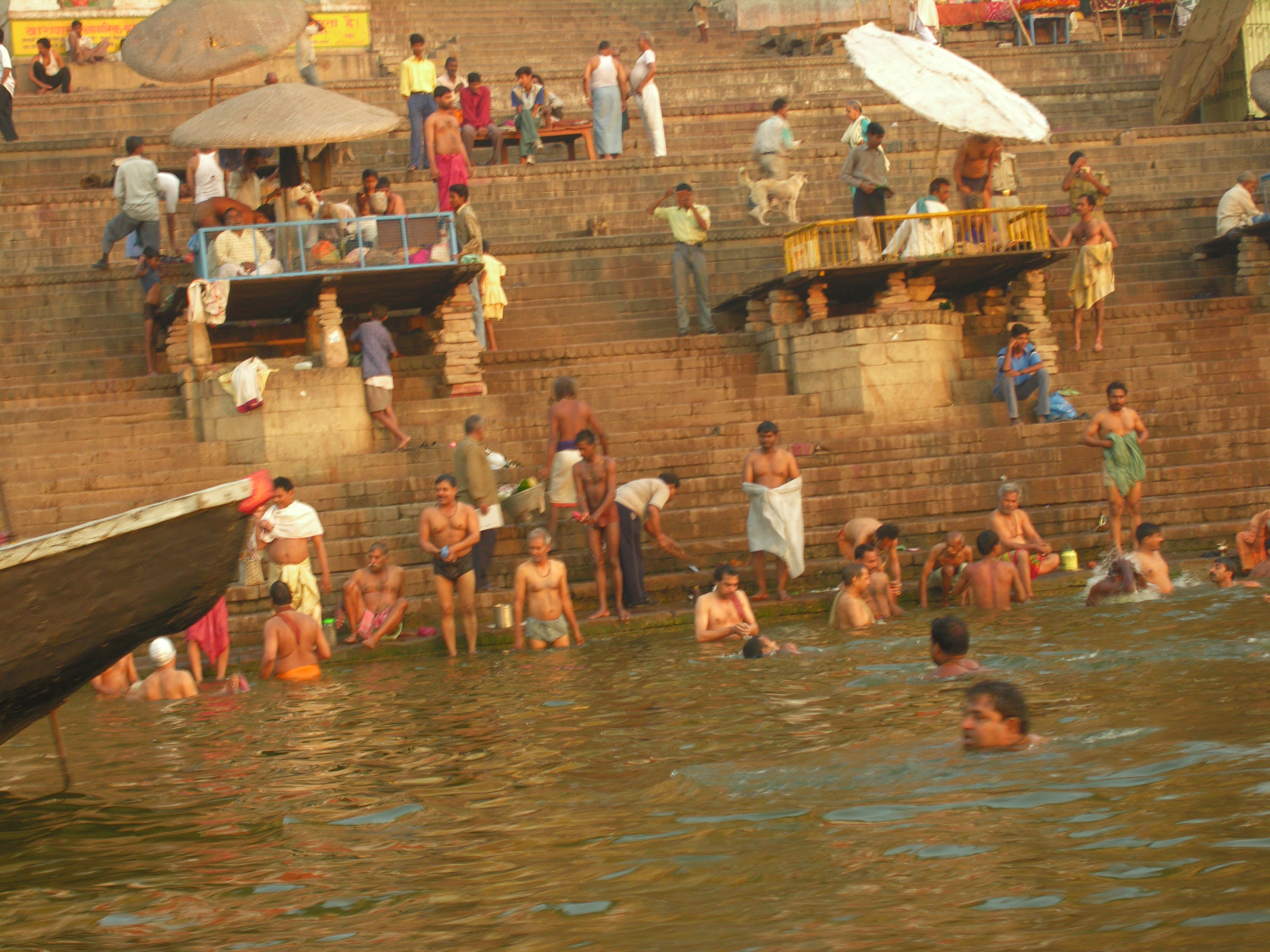 Varanasi in India